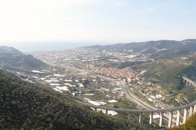 Panorama di Taggia, Liguria, Italia